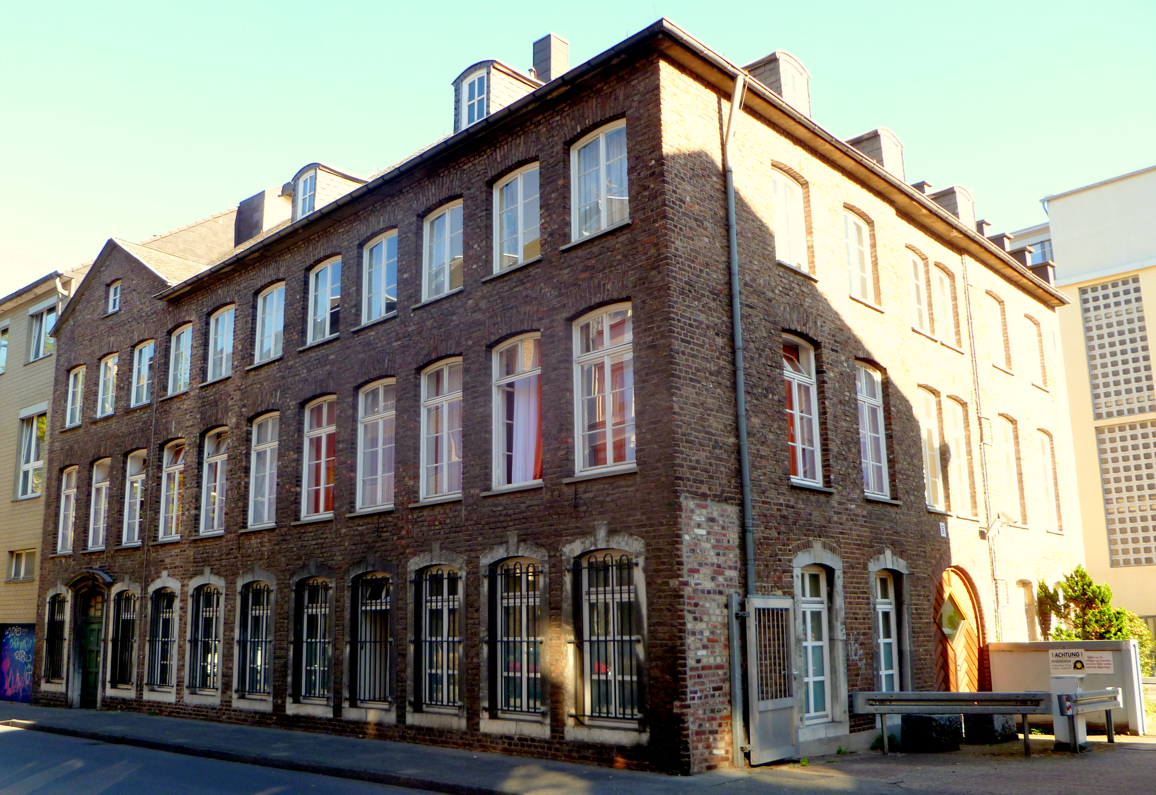 Mörgensstraße 5 in Aachen; erbaut von Johann Joseph Couven Mitte des 18. Jahrhunderts für die Bürgermeisterfamilie Moirke; ab 1860 zur Tuchfabrik Nellessen gehörend; Baudenkmal